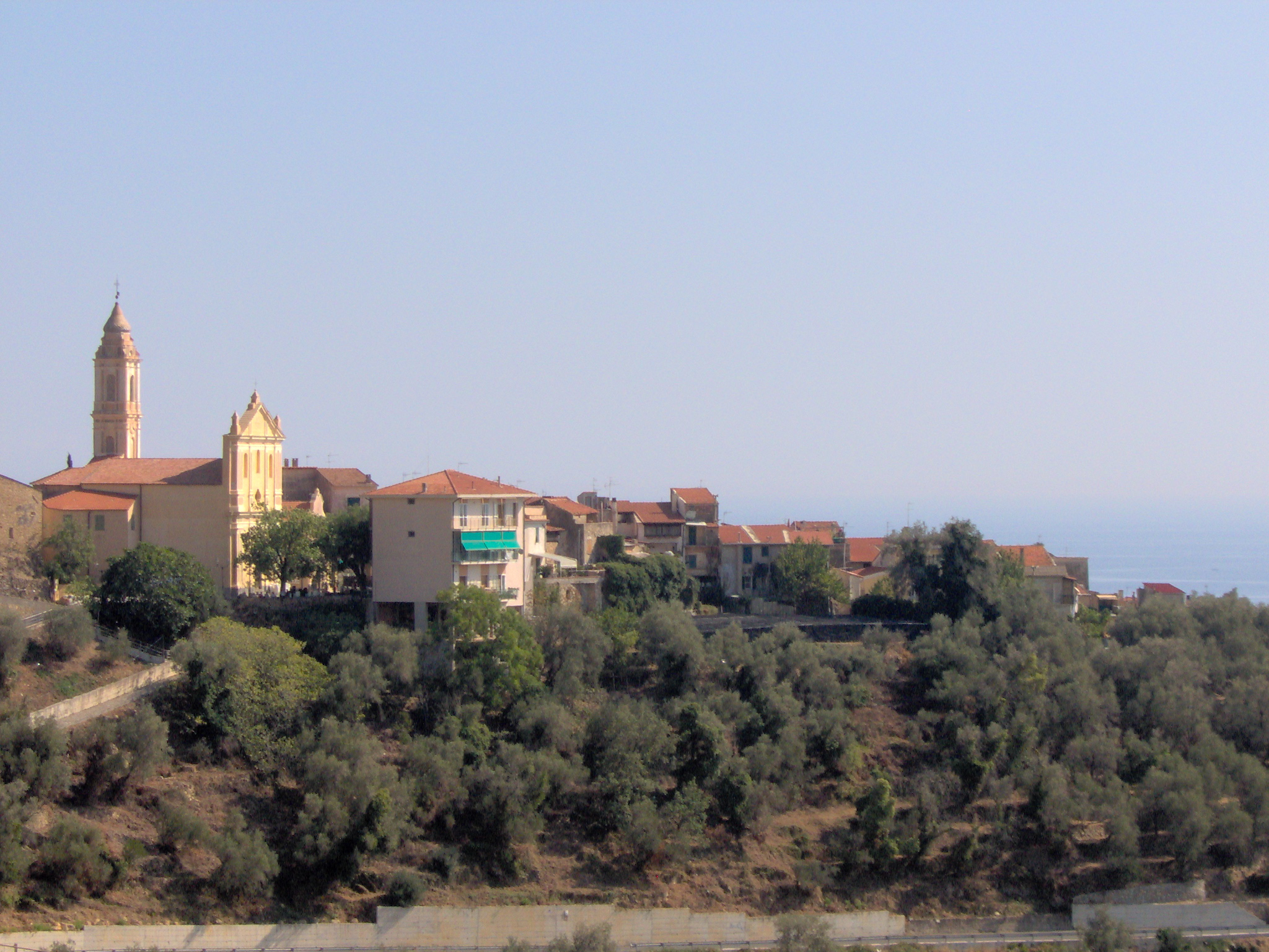 Terzorio visto da Ovest